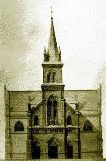 Diseño original del edificio de la Parroquia Inmaculada Concepción de Monte Grande